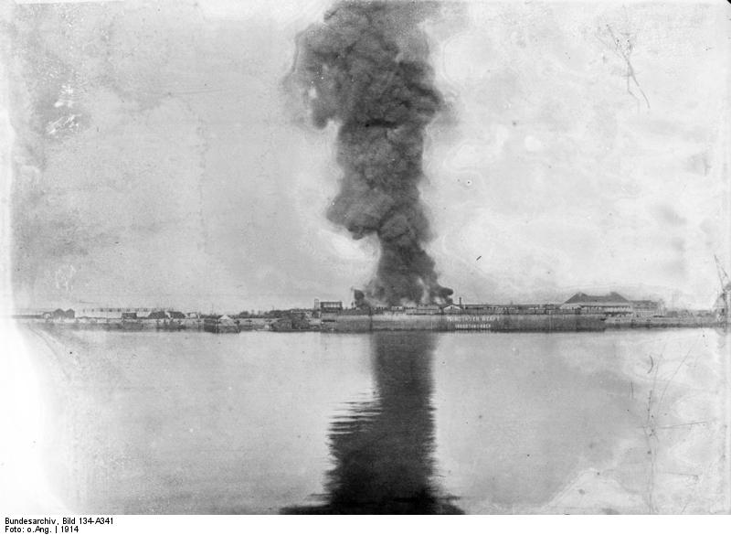 Schutzgebiet Kiautschou 1. Weltkrieg Tsingtau 1914 : Brand der Werft